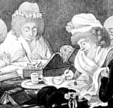 Anna Amalia mit Luise von Göchhausen(rechts) und Gesellschaft im Wittumspalais Ausschnitt aus dem bekannten Aquarell von Georg Melchior Kraus um 1795